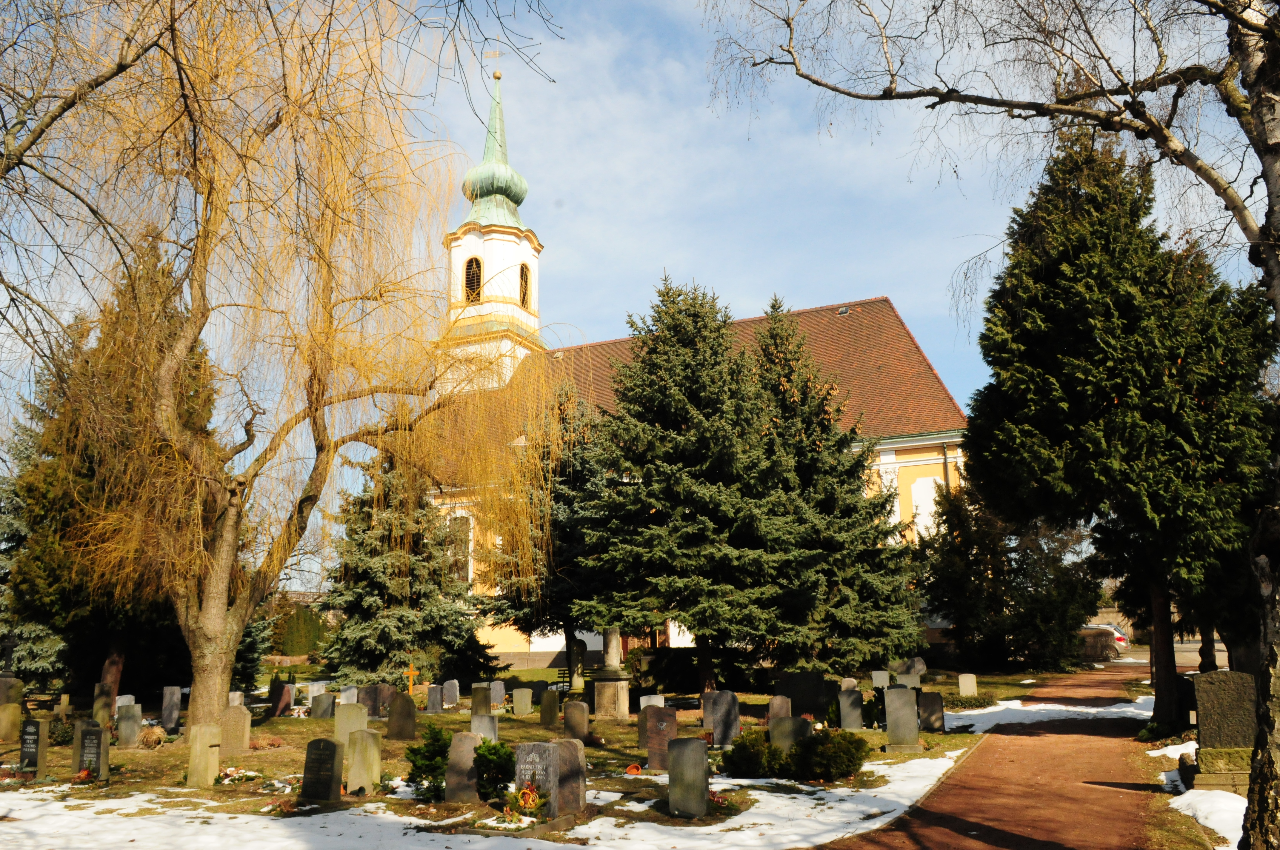 evangelische Matthäuskirche, Friedrichstraße 43, 01067 Dresden